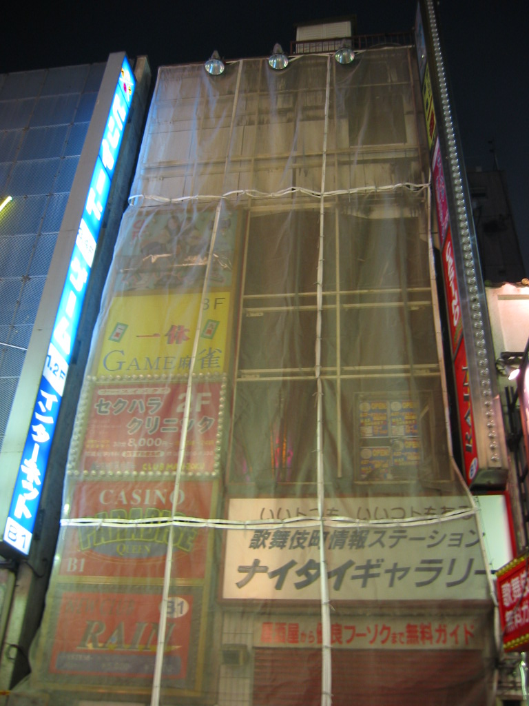 歌舞伎町で火災に遭ったビル。